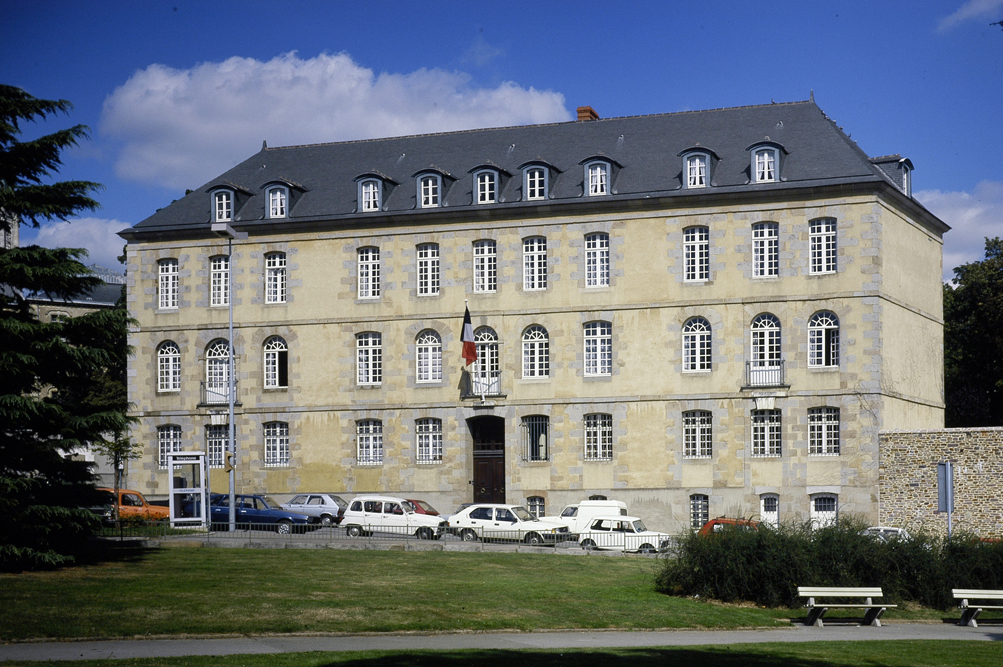 Façade de l'hôtel Bon Pasteur - 1986 - Rennes Après acquisition par le Conseil Régional